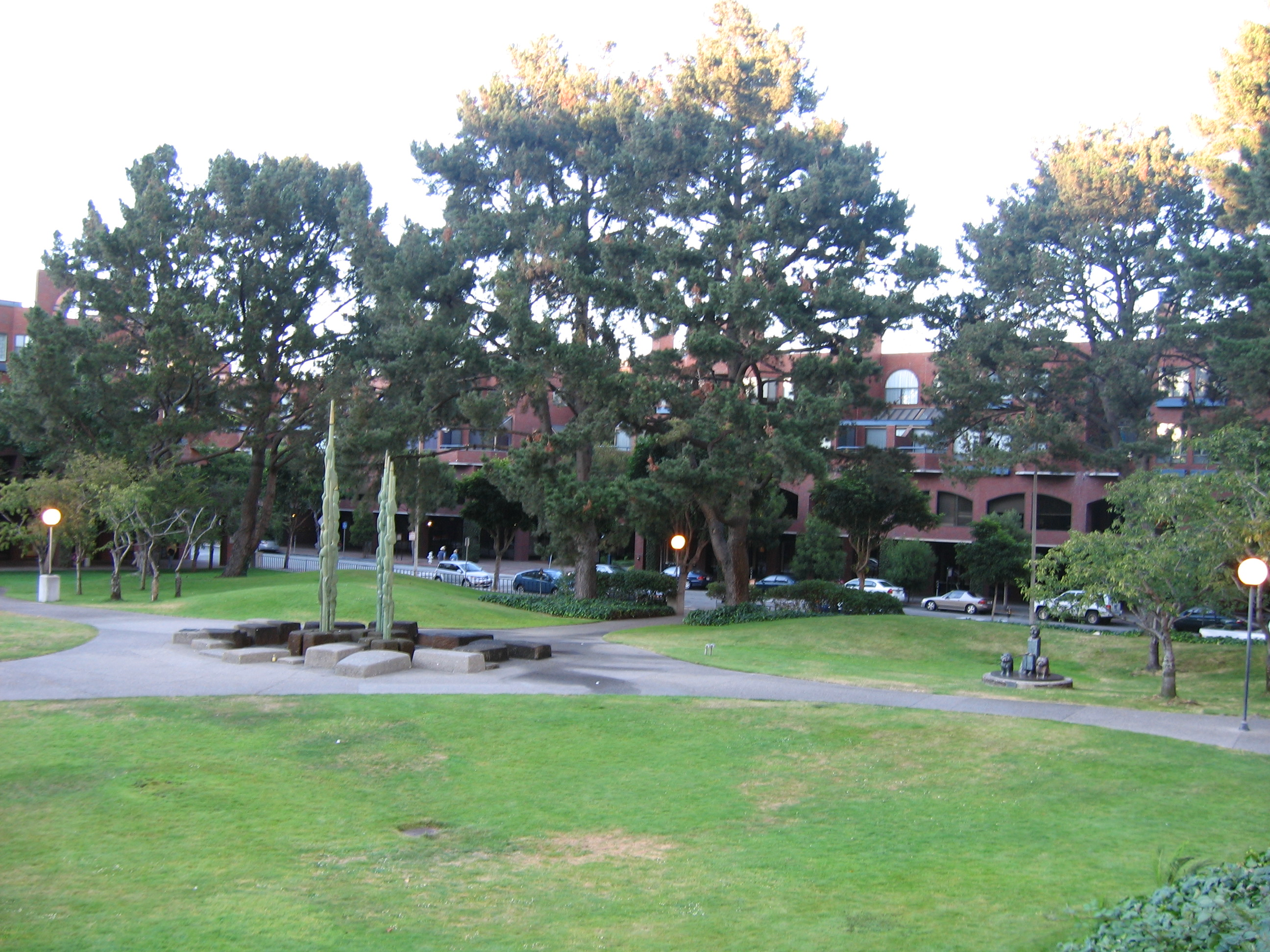 Гледка от градският парк Сидни Г. Уолтън Скуеър в Сан Франциско.